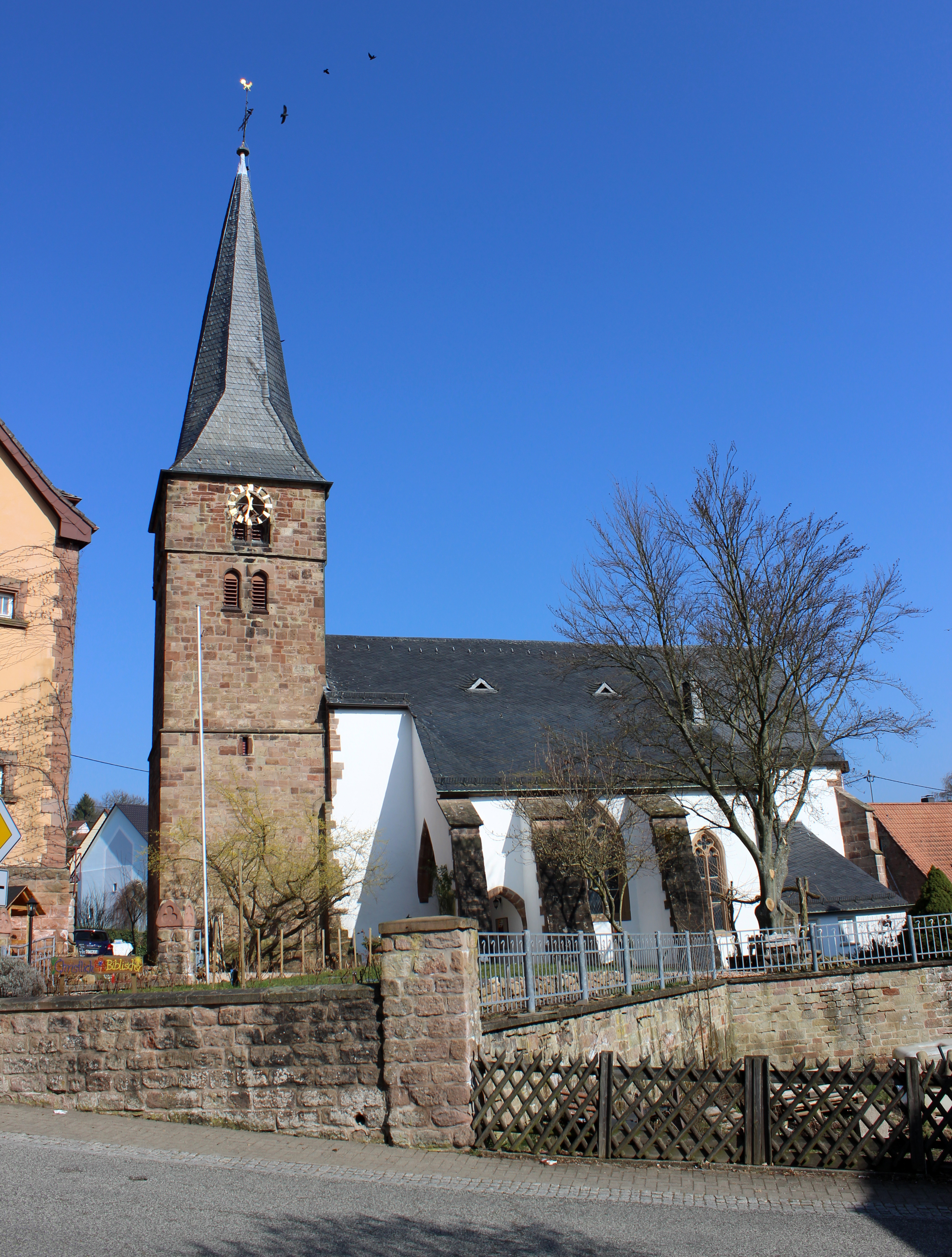 Die evangelische Margarethenkirche in Niederkirchen im Ostertal, einem Stadtteil von St. Wendel, Saarland